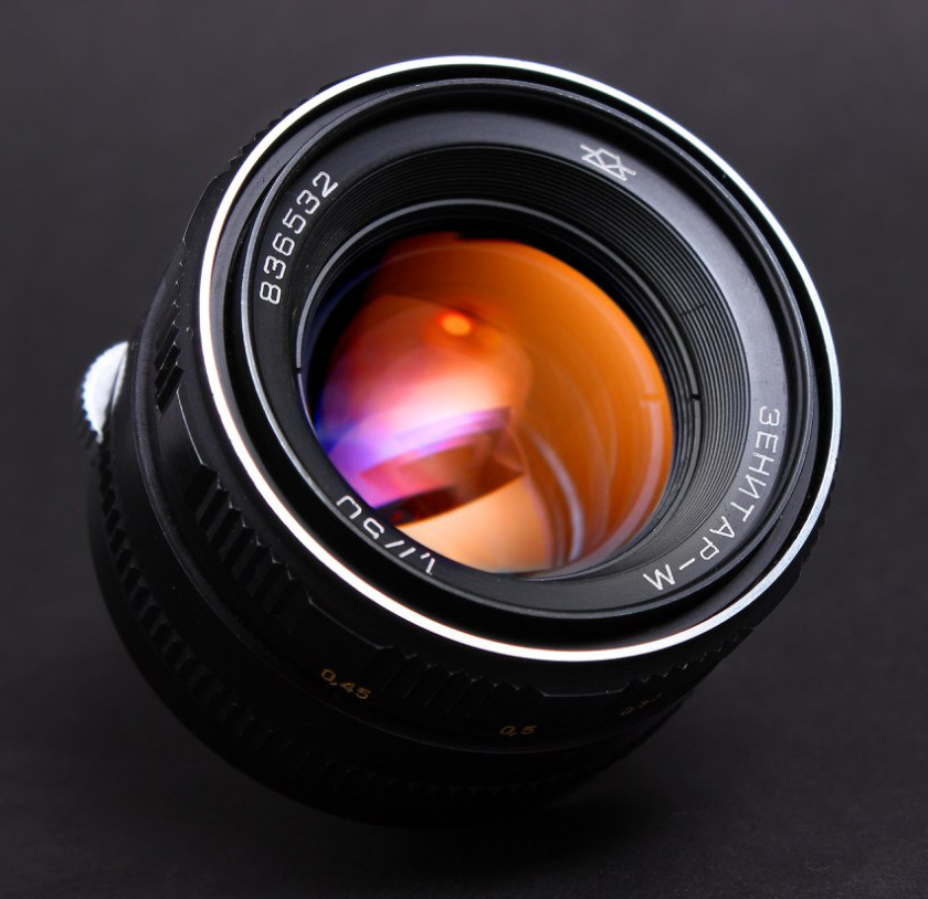 Нормальный фотообъектив Зенитар-М (1,7/50)